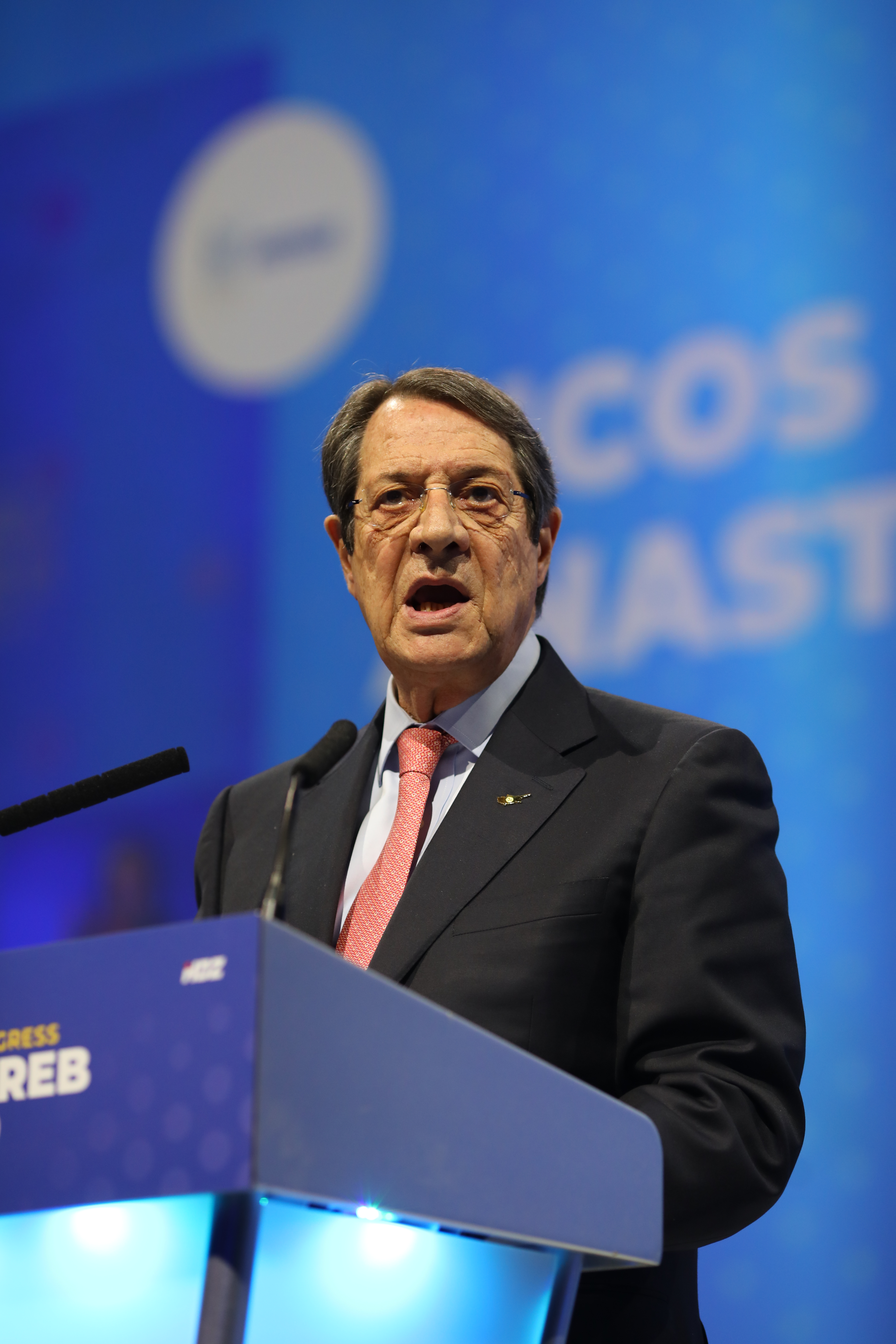 20-21 November 2019